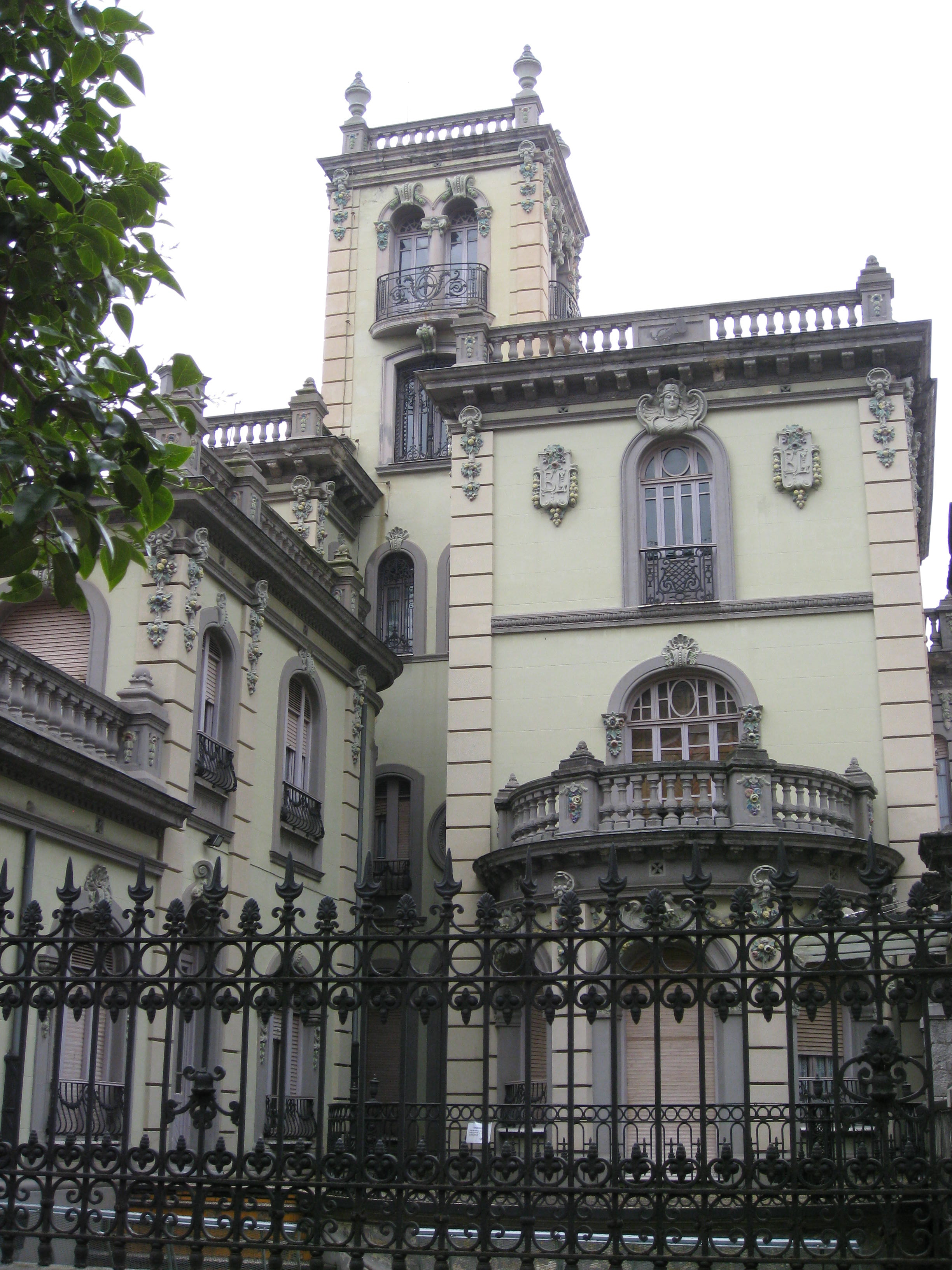 Palacio de Balsera, Avilés, Asturias